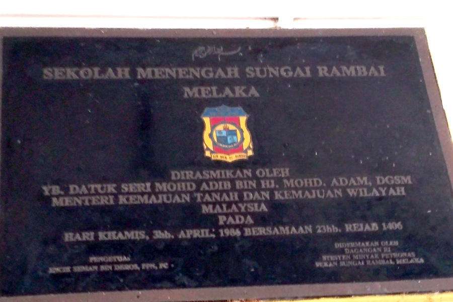 plat perasmian smksr